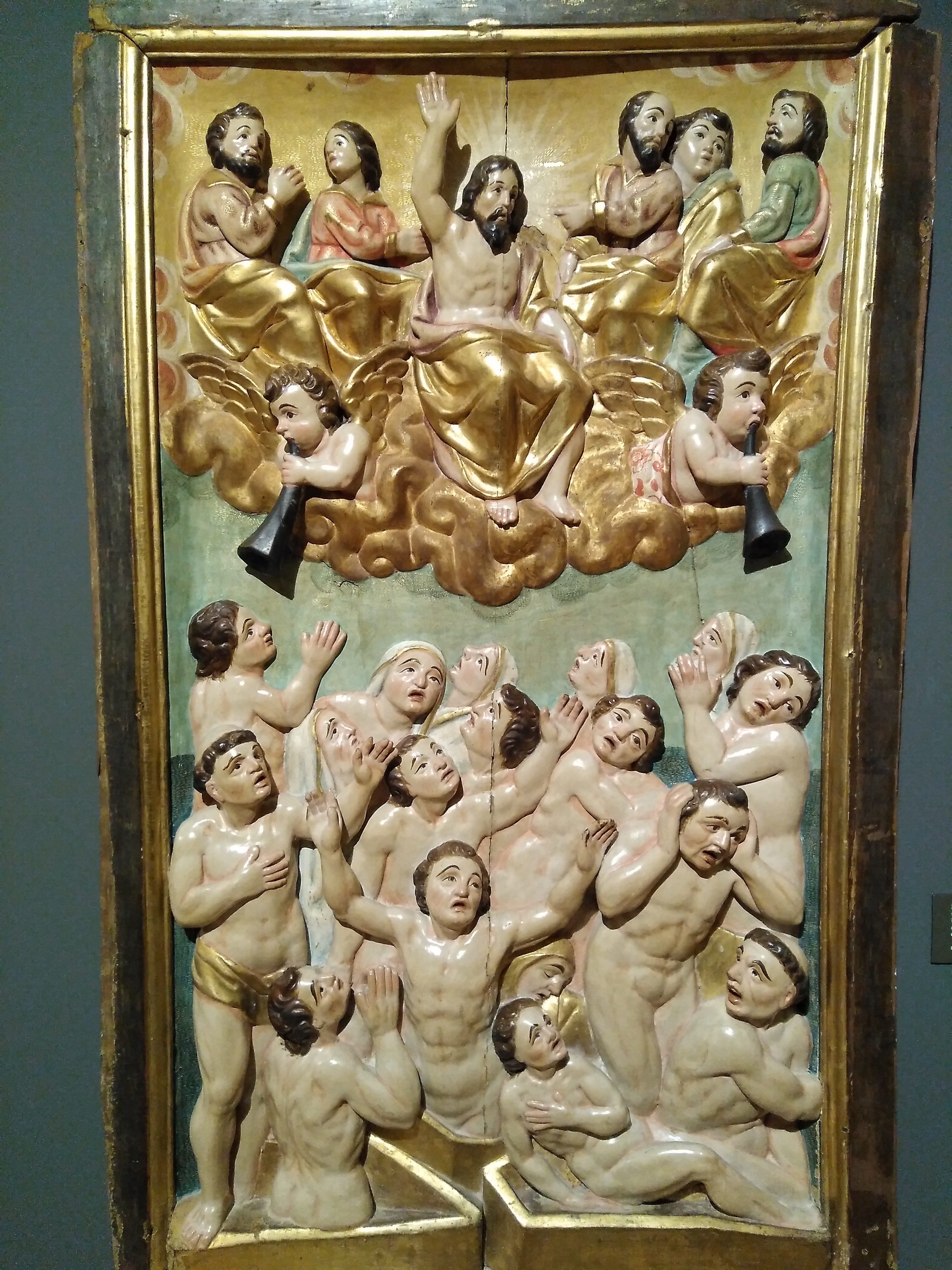 Relleu de la resurrecció dels morts, fragment del retaule de les ànimes de Guissona, de l'escultor Joan Grau